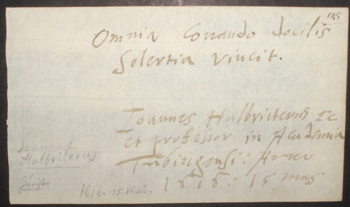 Omnia conando docilis solertia vincit. Johann Halbritter (1560-1627), deutscher Jurist, eigenhändiges Stammbuchblatt, Tübingen, 15. Mai 1616. Lateinische Handschrift auf Papier, 1 Bl., ca. 13,5 × 7,8 cm